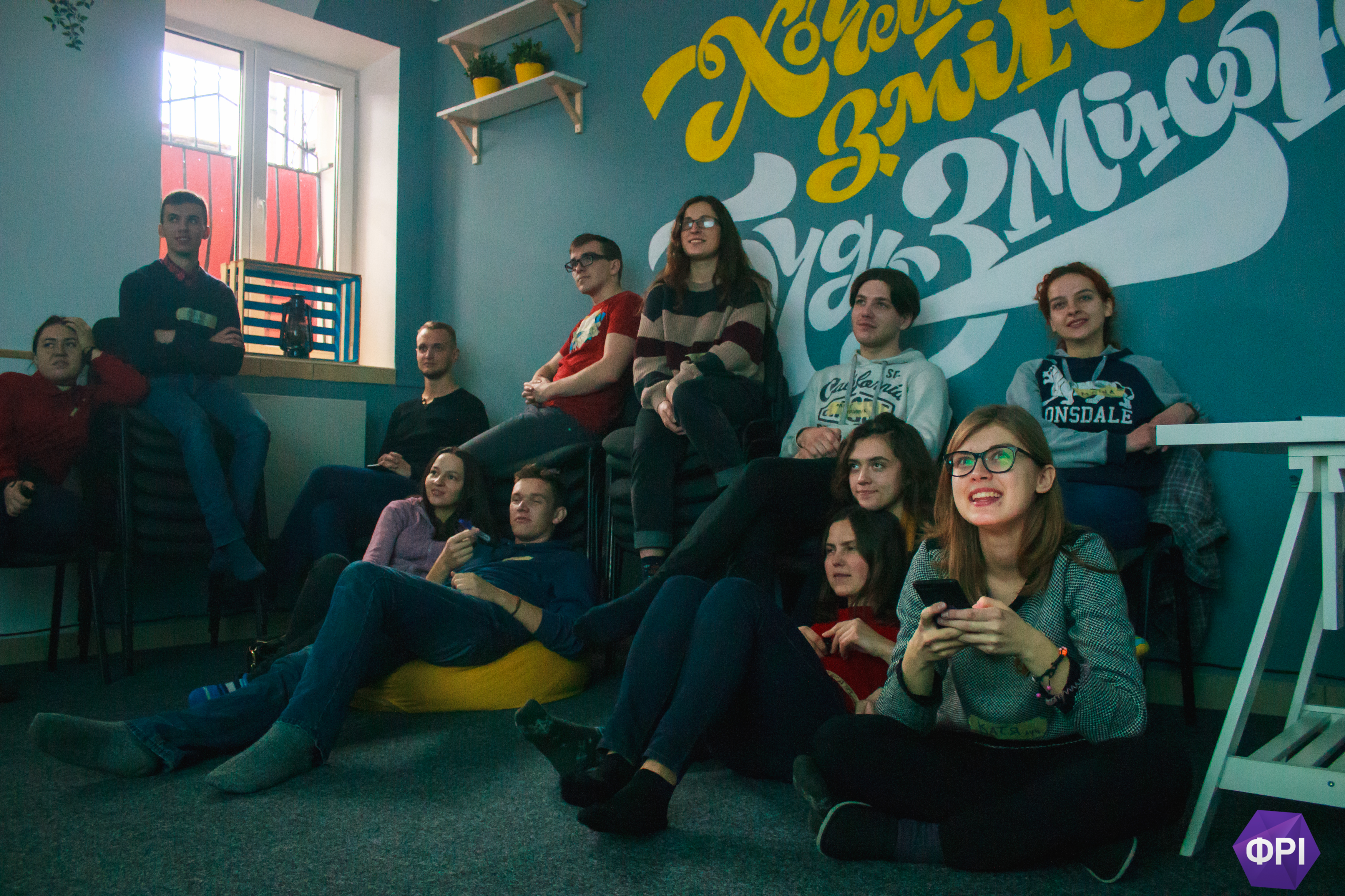 велика кімната